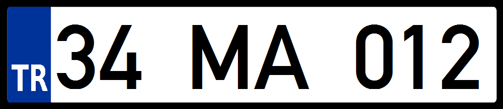 نمونه پلاک ترکیه